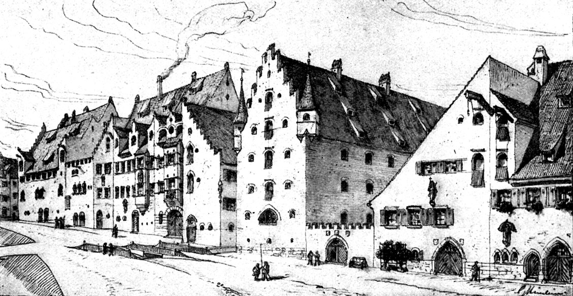 Abb. 51. Das städtische Zeughaus und das Stadthaus am Anger (Jakobsplatz).